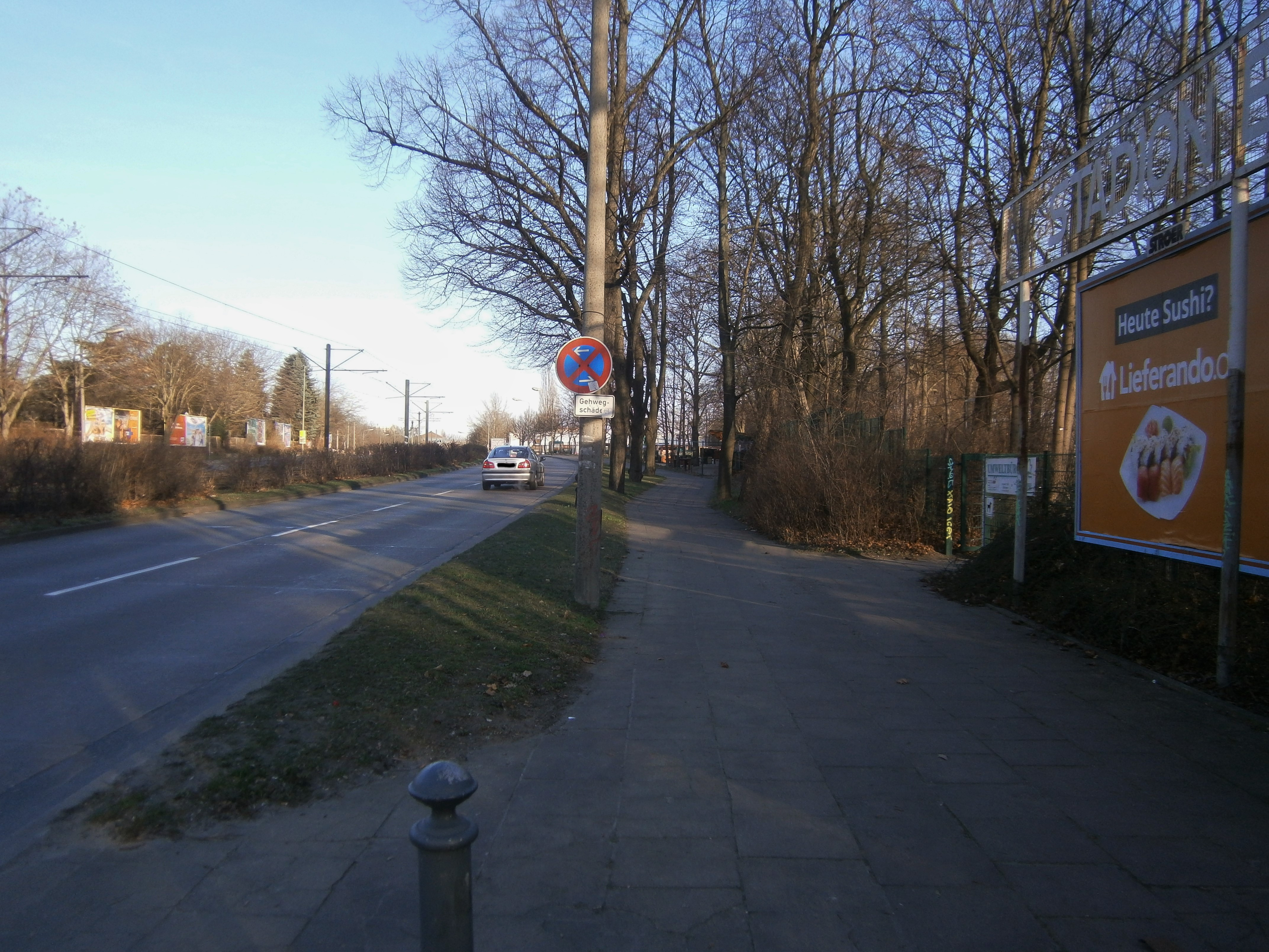 Die Hansastraße ist eine Berliner Straße mit übergeordneter Bedeutung in den Ortsteilen Alt-Hohenschönhausen und Weißensee. Sie liegt zwischen der Indira-Gandhi-Straße und der Großsiedlung Hohenschönhausen-Nord. Im Bild rechts das vormalige Ende der Kniprodeallee am Stadion Buschallee und links der 1986/1988 neugebaute Übergang an den vorherigen Nordostabschnitt der Falkenberger Straße.